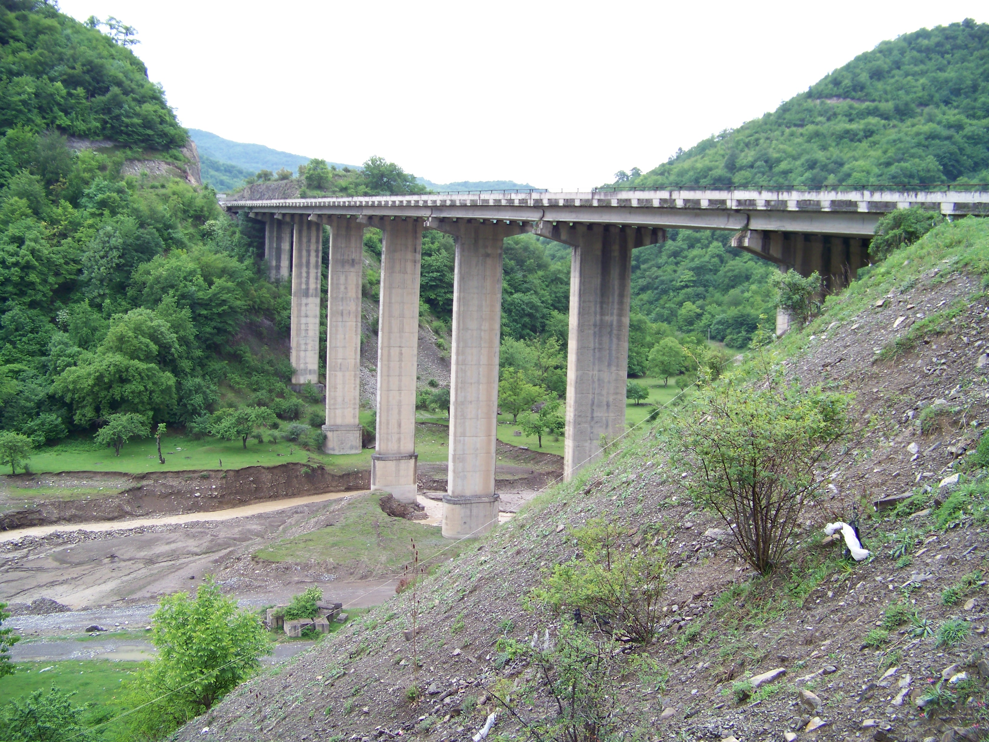 ხიდი ანანურთან, საქართველოს სამხედრო გზაზე